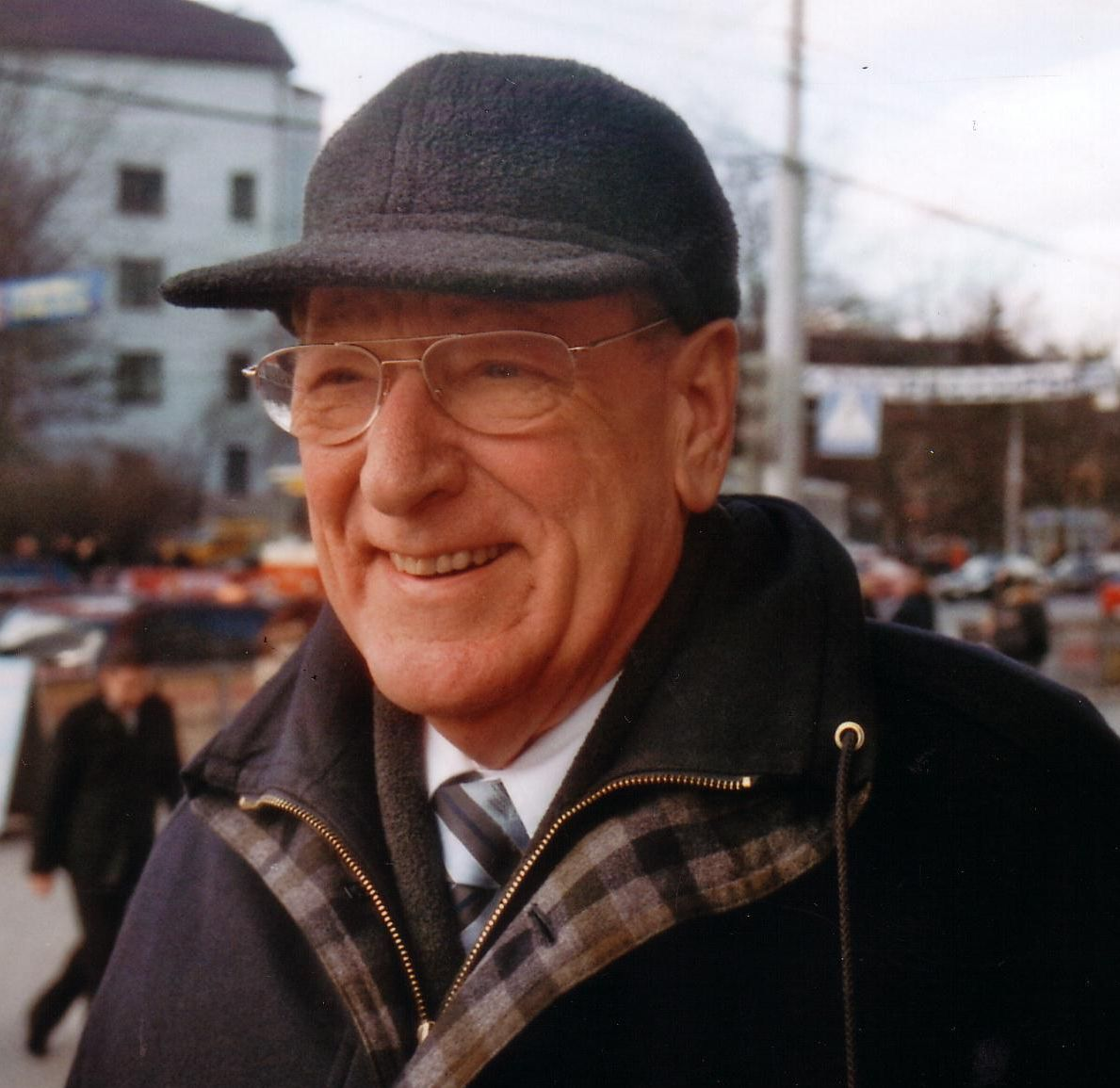 Porträtfotografie von Hatto Klamt